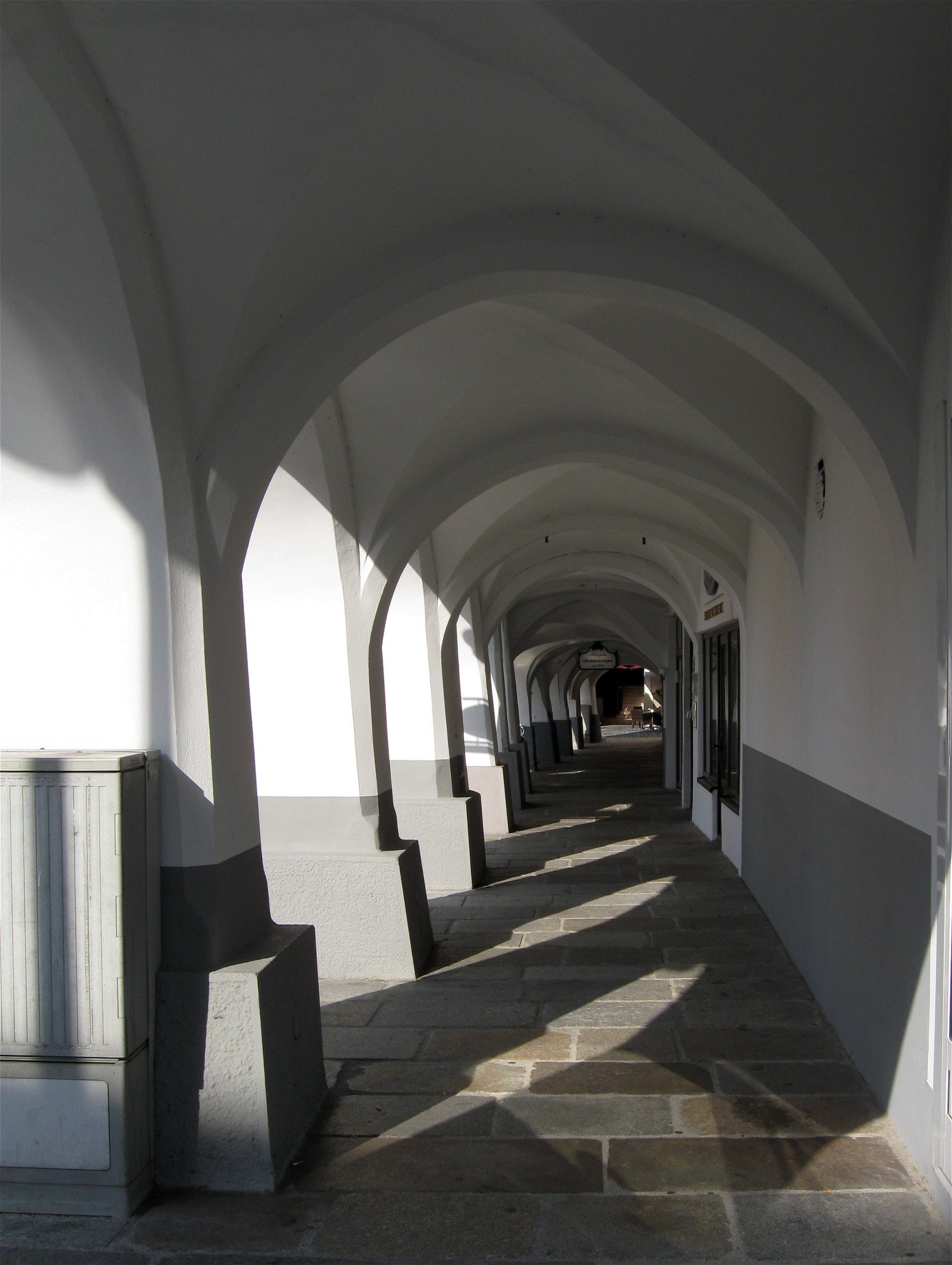 Erdgeschosslauben, Ludwigsplatz 9-11, Rosenheim